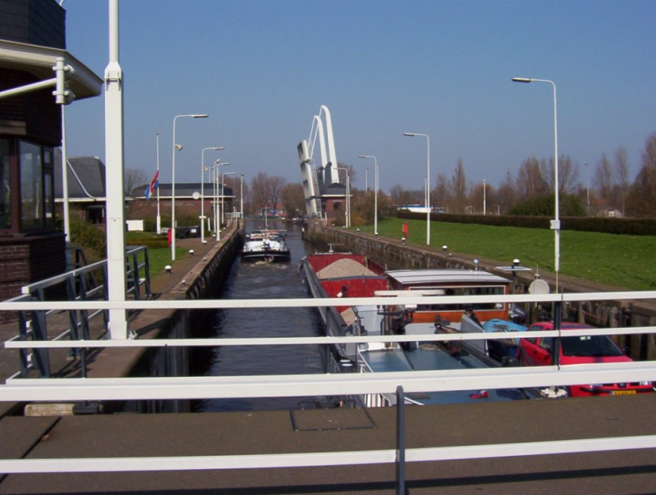 Julianasluis in Gouda, geopend richting Gouwe Kanaal. Eigen foto, gebruik vrij